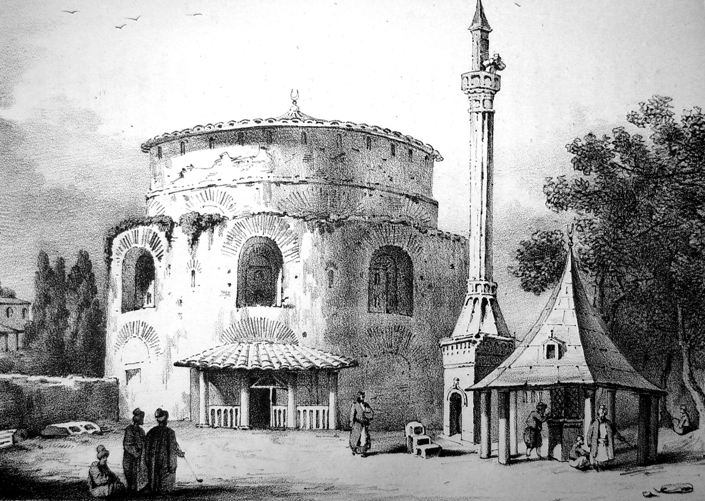 La Rotonde de Galère / Saint-Georges, transformée en mosquée, à Thessalonique.